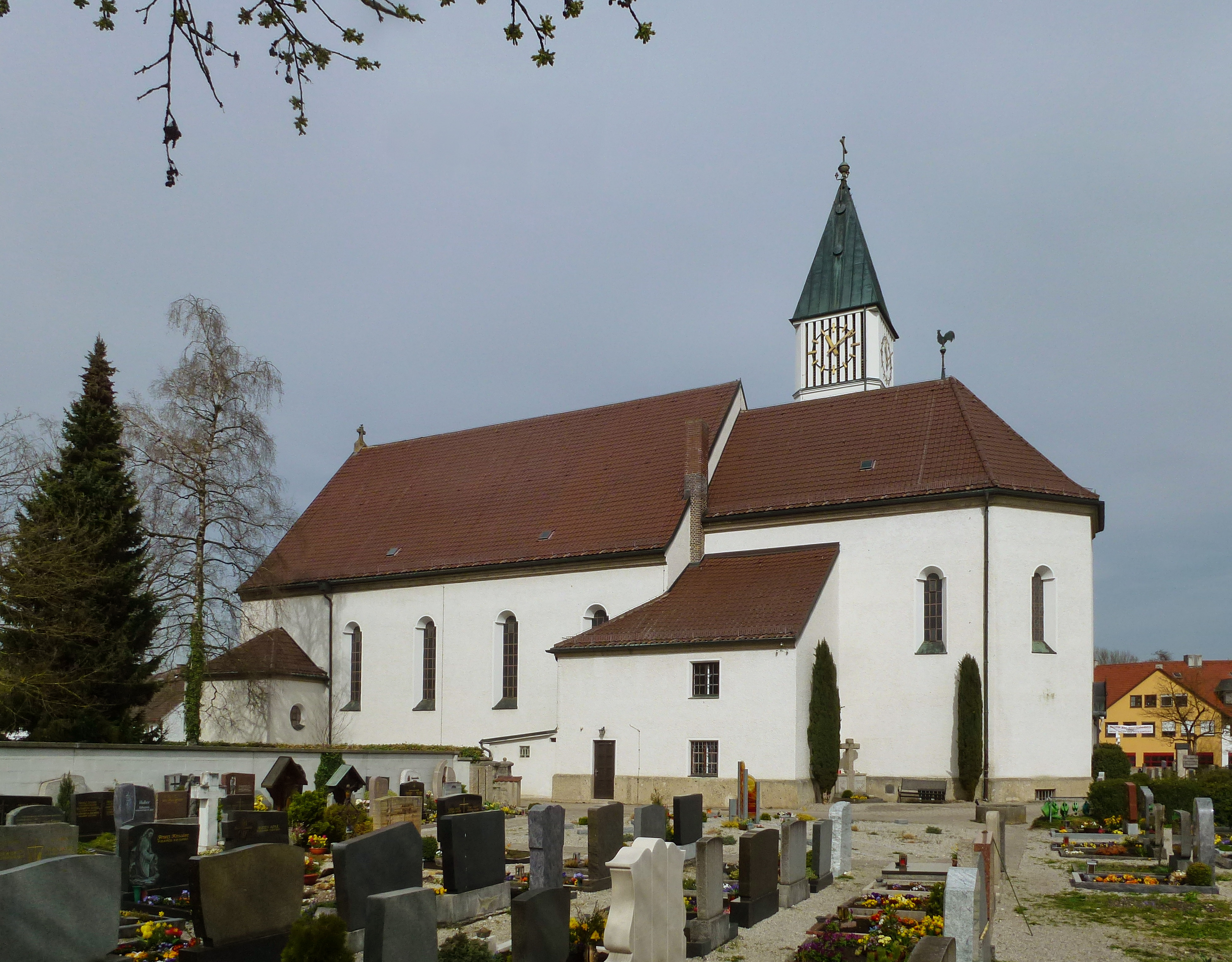 Emmering, katholische Pfarrkirche St. Johann Baptist & Evangelist mit dem südlichen Teil des Friedhofes. Ansicht von SO